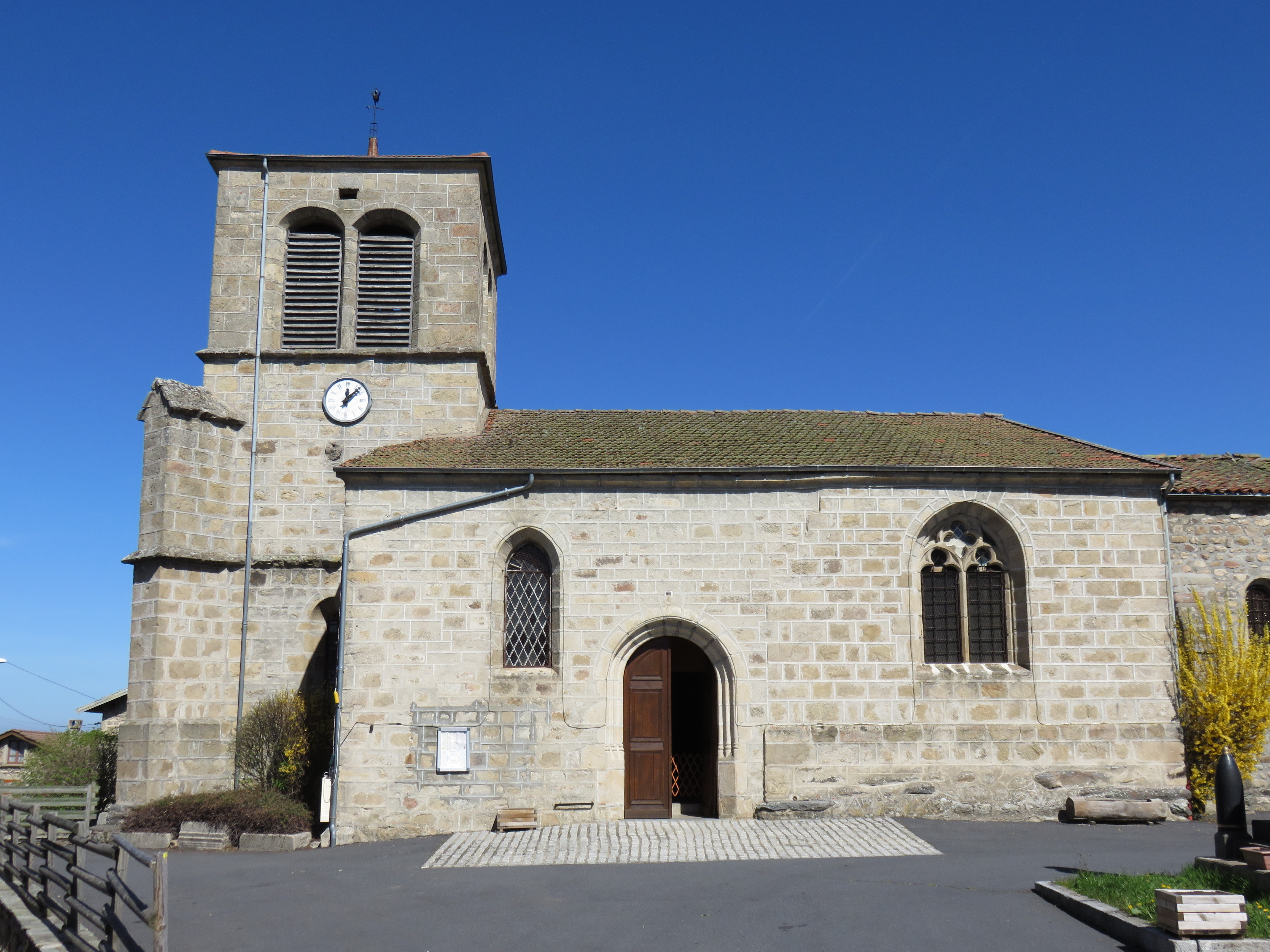 Église Saint-Just de Saint-Just (Puy-de-Dôme, France).